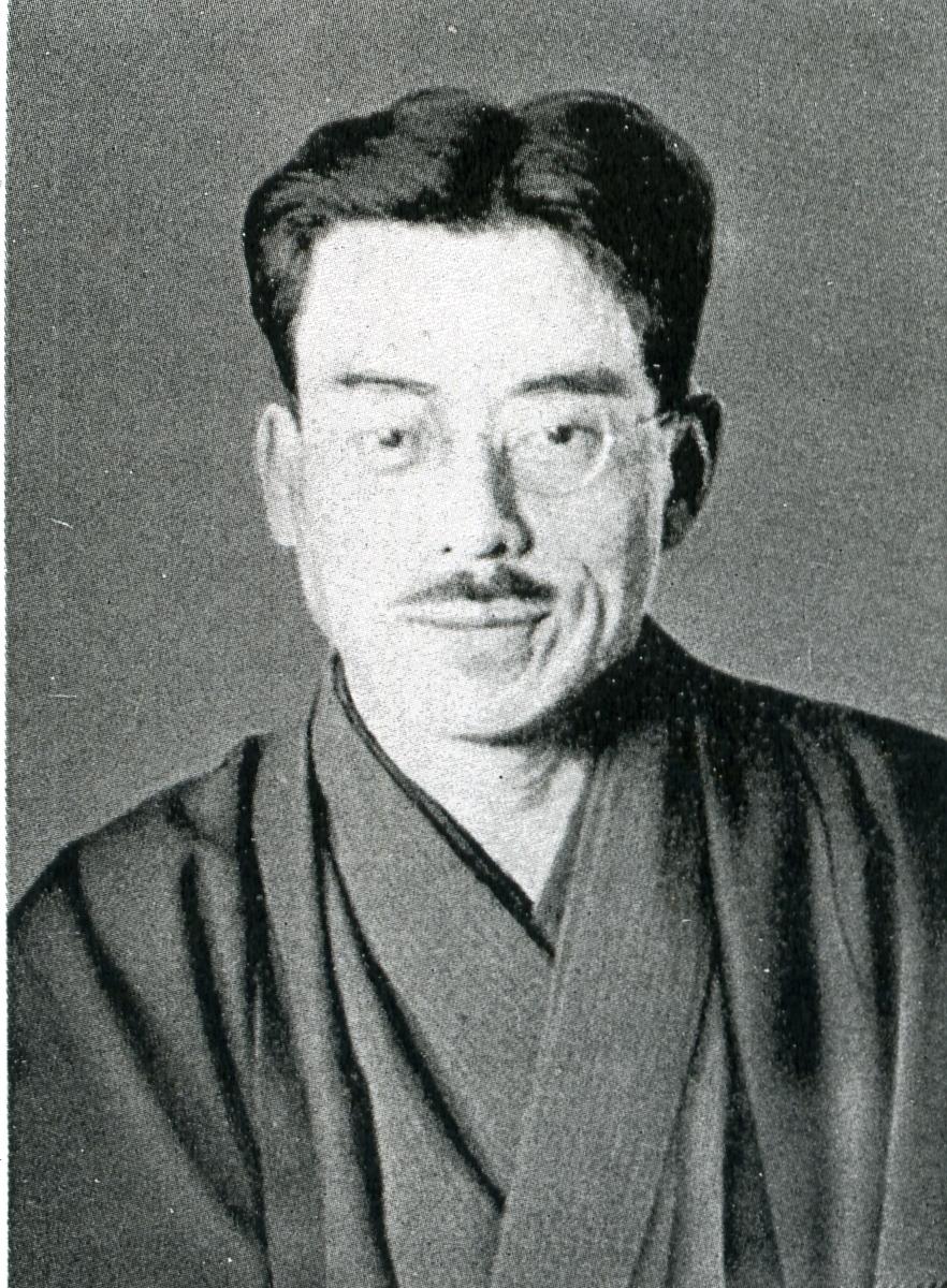 この写真は、児玉右二（1873-1940）の写真です。